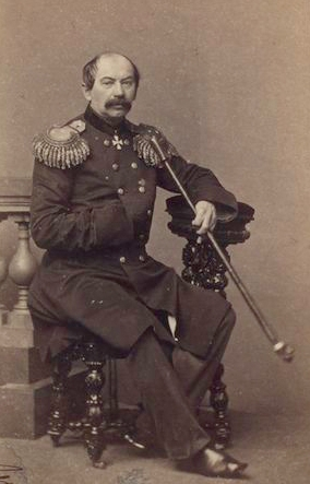 Хрулёв, Степан Александрович